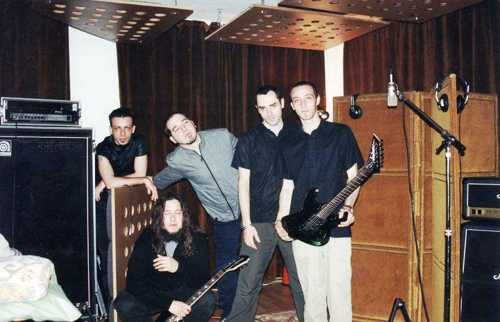 Elecktra año 2001, grabando Holograma.